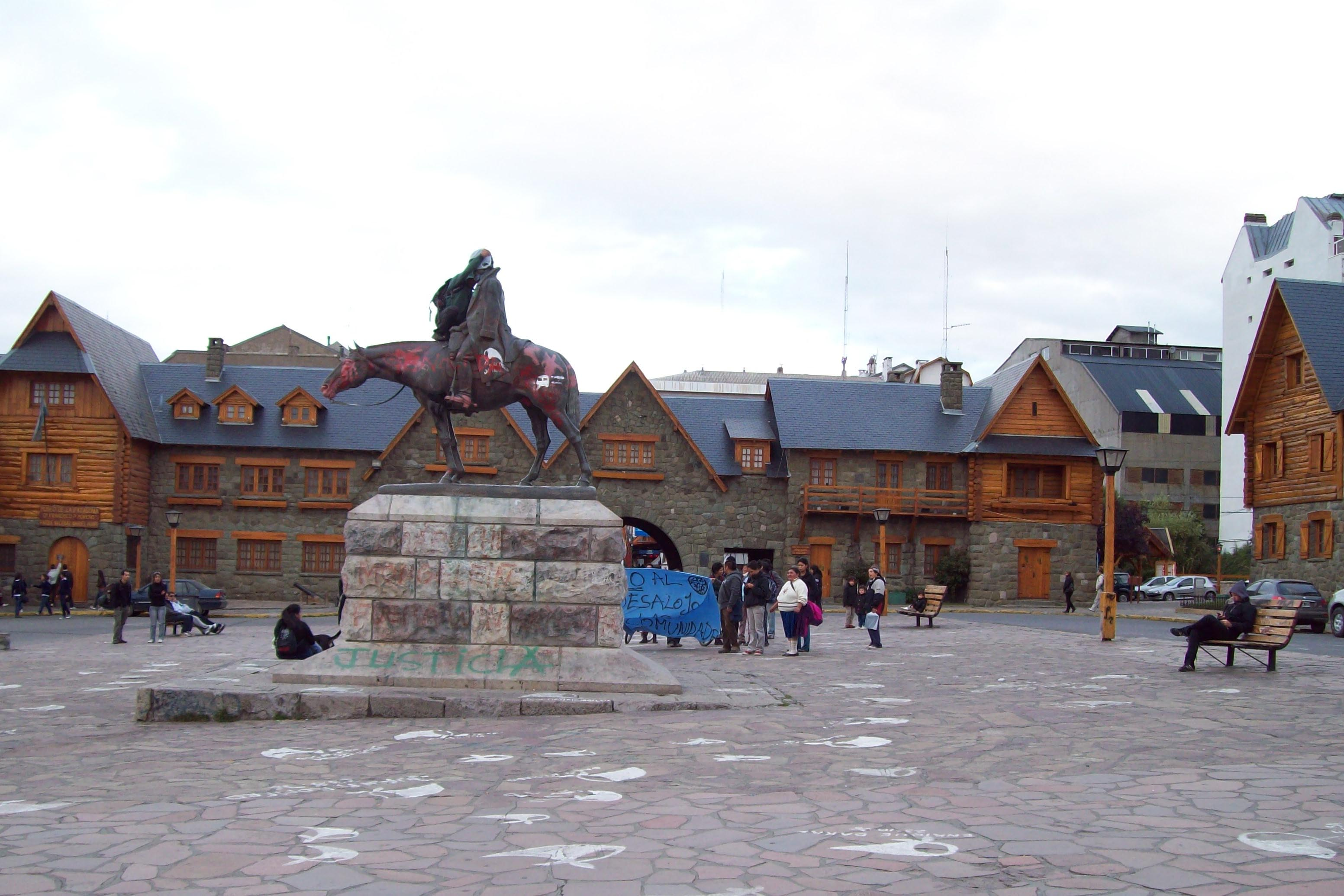 Centro Cívico e Intendencia de Parques Nacionales